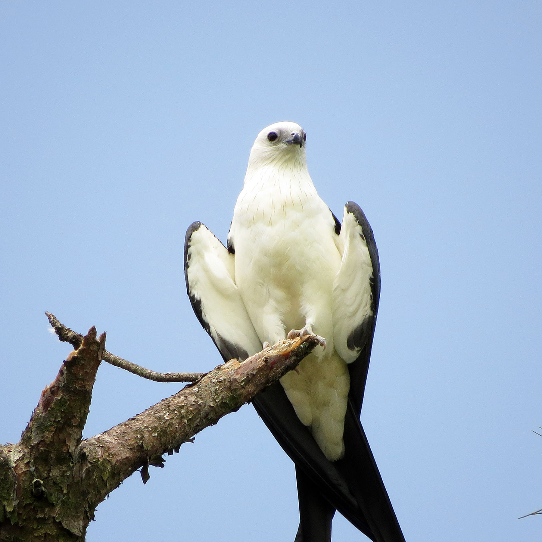 Elanoides forficatus forticatus 26Jul 14 Allendale, SC